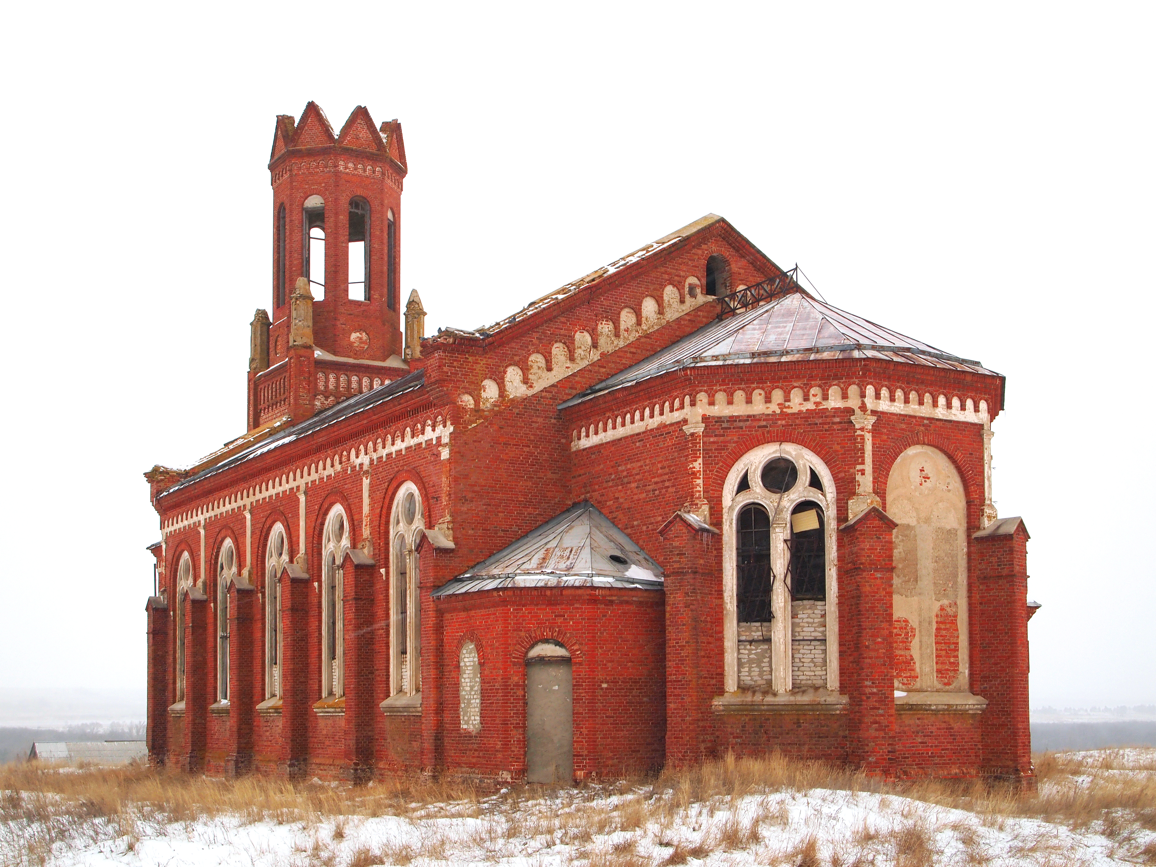 Лютеранская кирха: Гречихино, Жирновский район, Волгоградская область